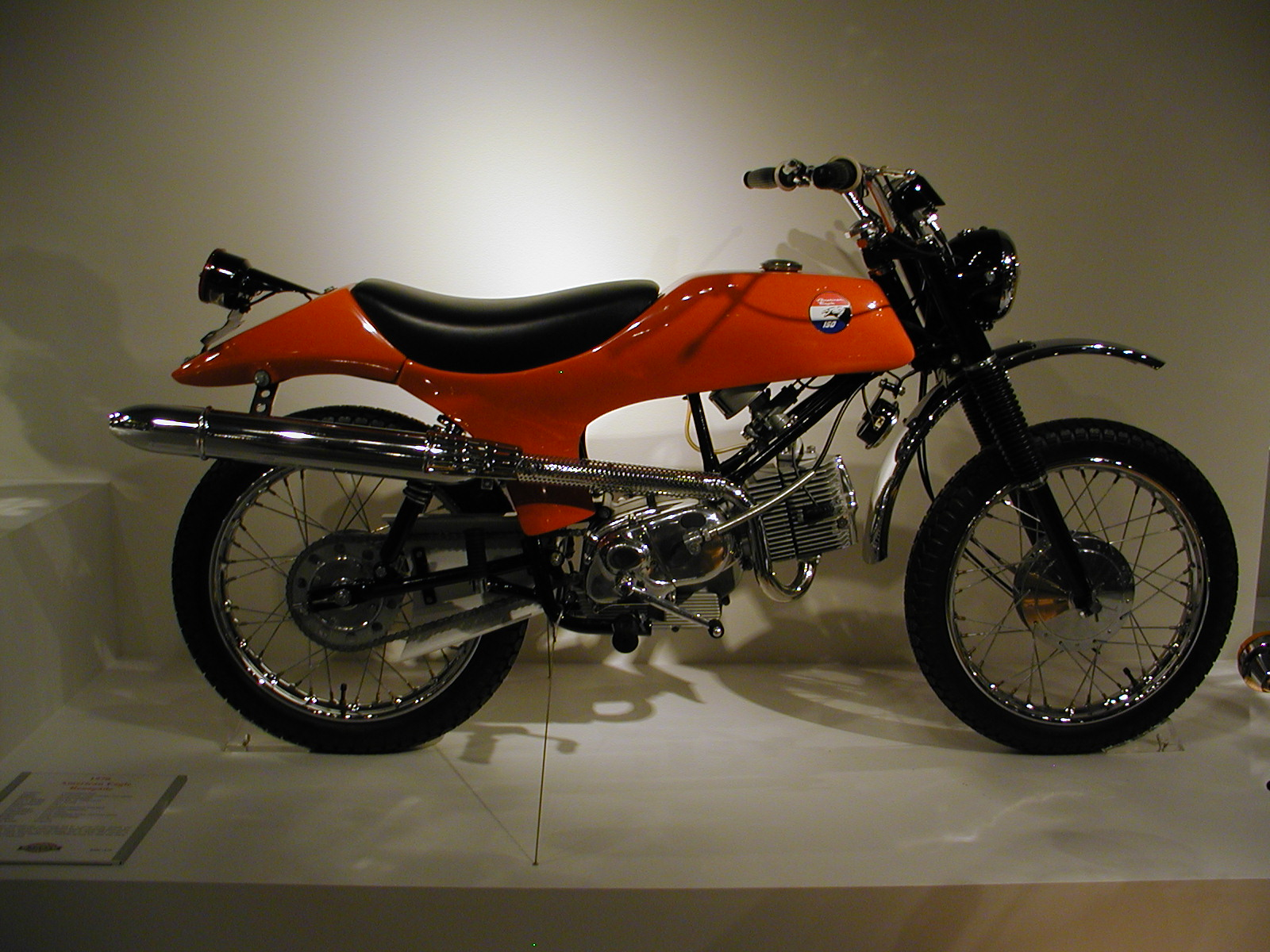 American Eagle Renegade 150 del 1970 prodotto dalla Laverda